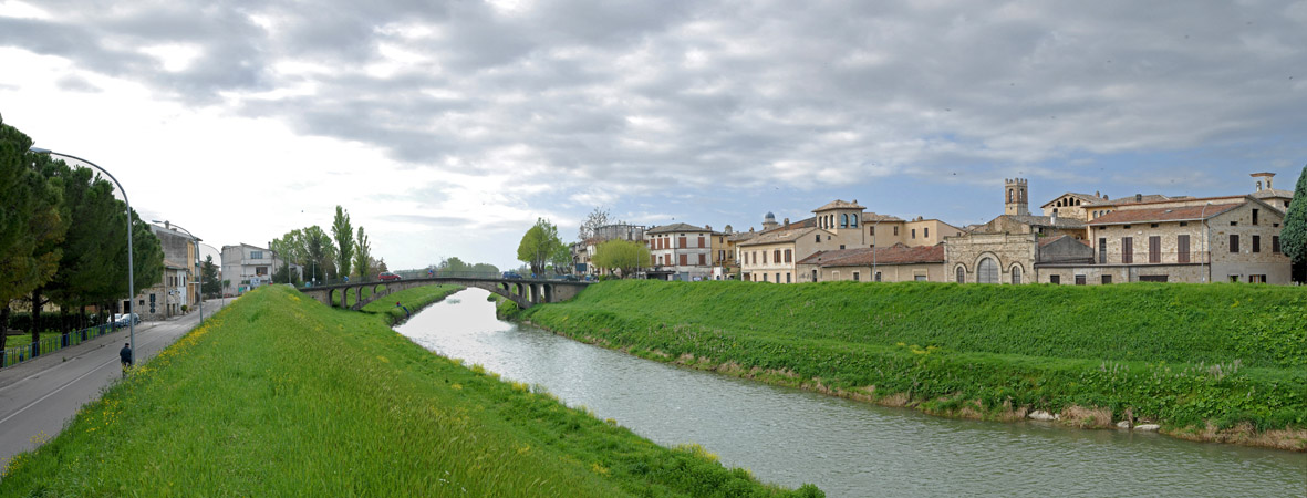 Foto panoramica del ponte di Cannara sul fiume Topino, 2008